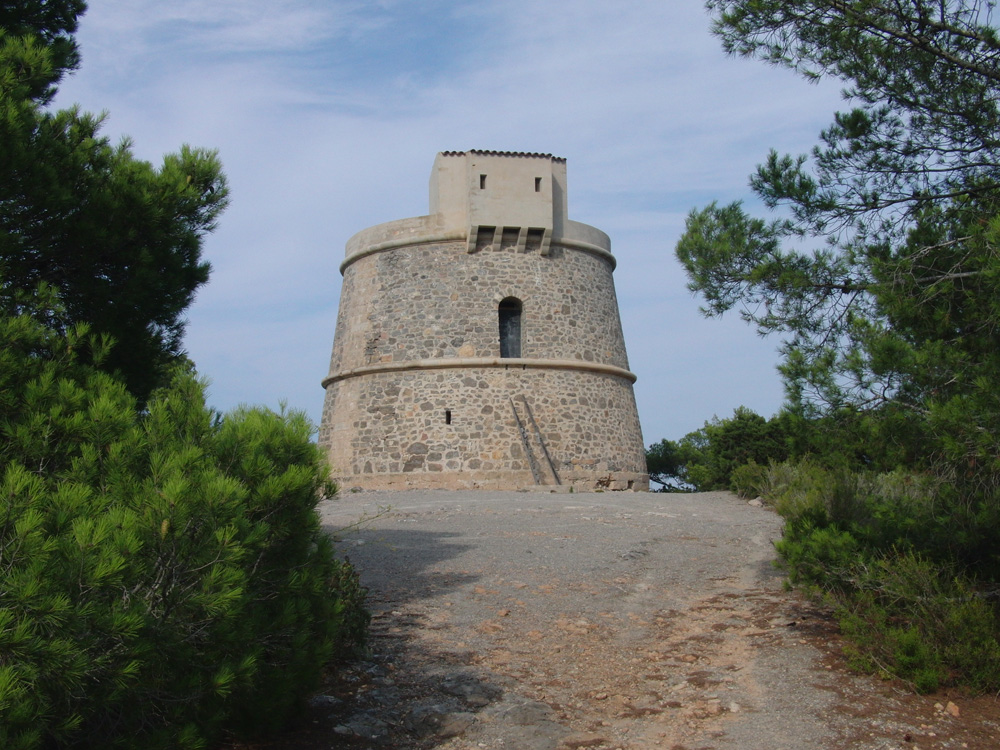 Piratenturm von Valls, gegenüber der Insel Tagomago, Ibiza;07.11